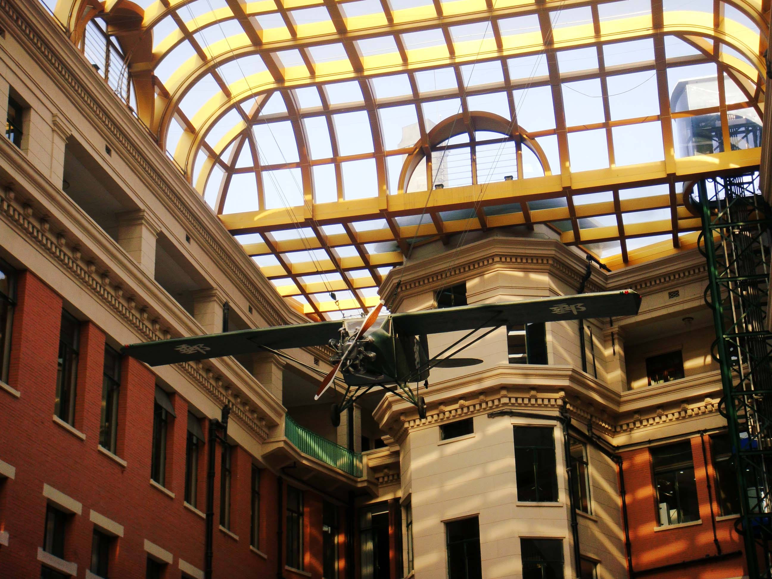 上海至南京空中邮线所使用的飞机